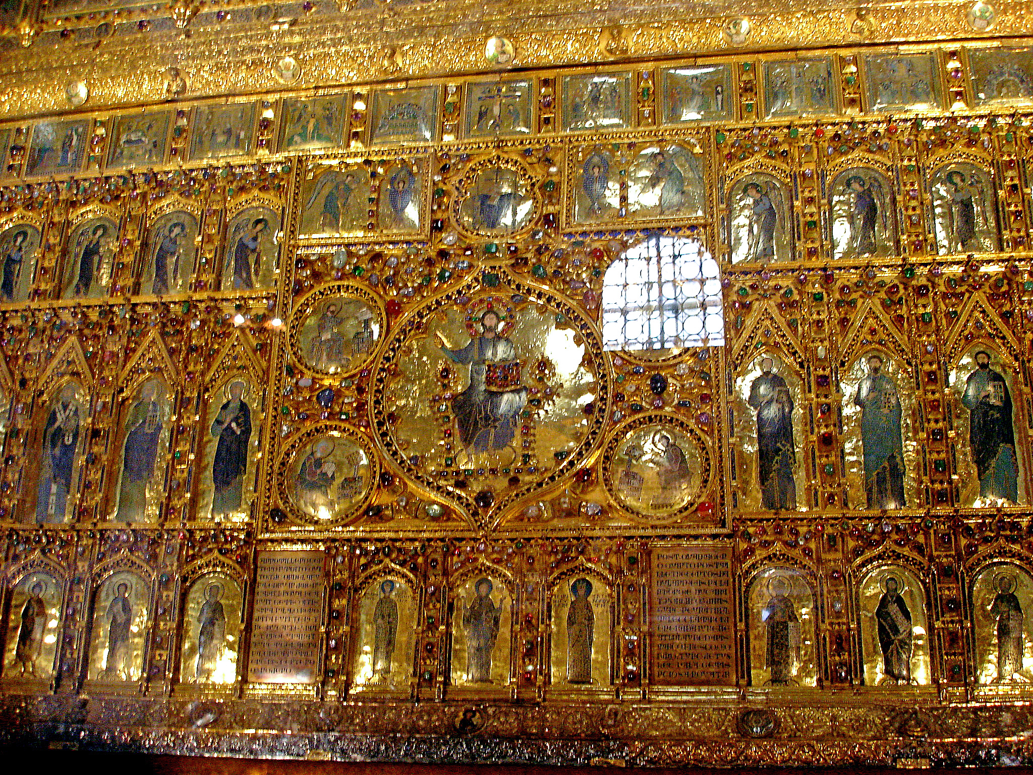 Die Pala d'Oro (Goldene Altartafel), Größe: 1,40 x 3,45 m, Altaraufsatz mit überreichem Edelsteinschmuck und herrlichen Emailbildern. Fertigstellung durch Gianpaolo Buoninsegna 1345 (vom 10.-14. Jh.ausgeführt), mit Szenen aus dem Leben Jesu, der Gottesmutter und dem Hl. Markus.